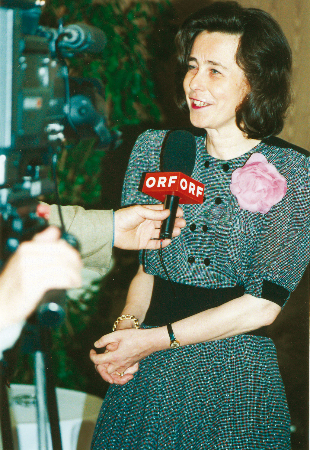 Marion Diederichs-Lafite (zum wikipedia Artikel)